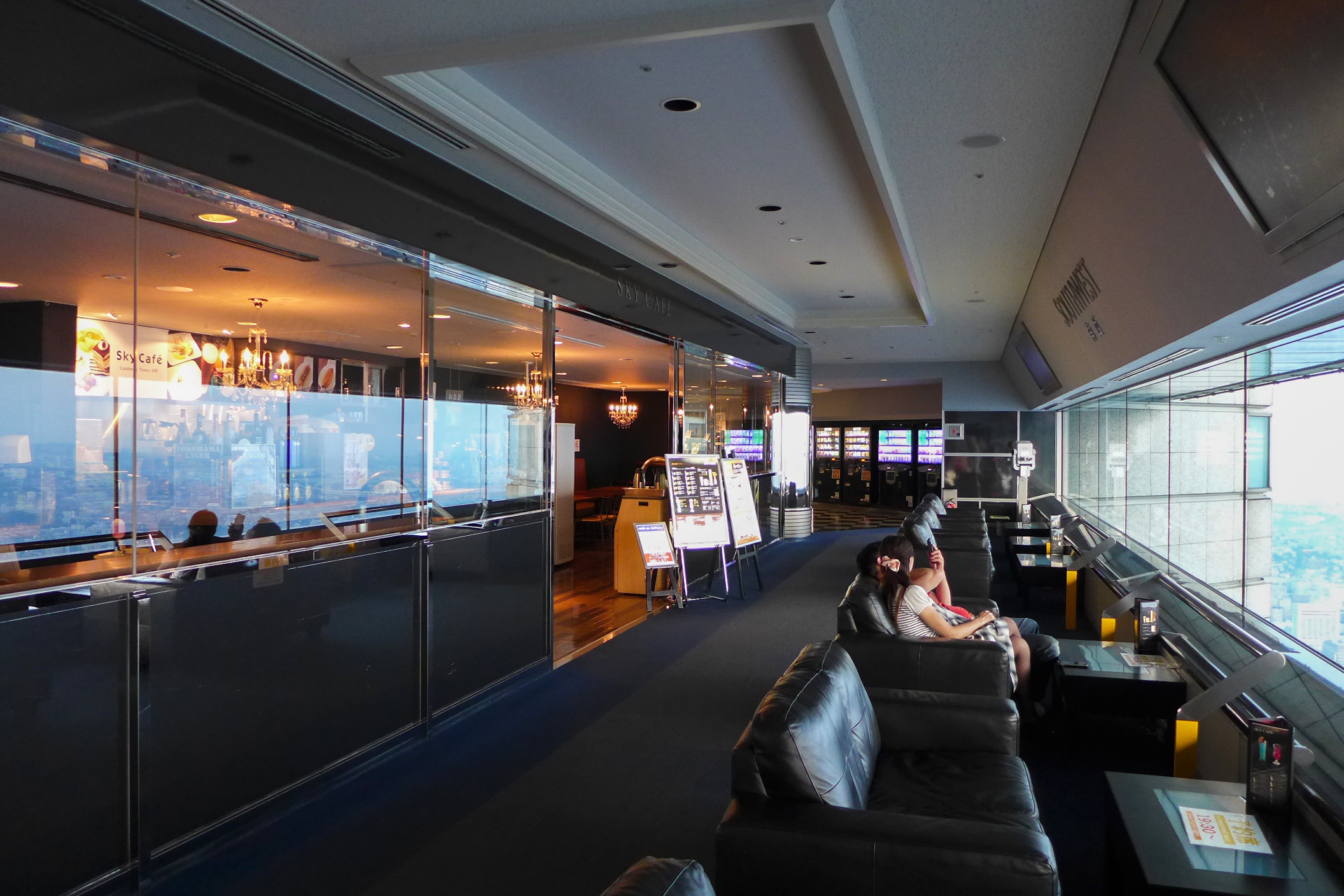 Landmark Tower SKY Garden